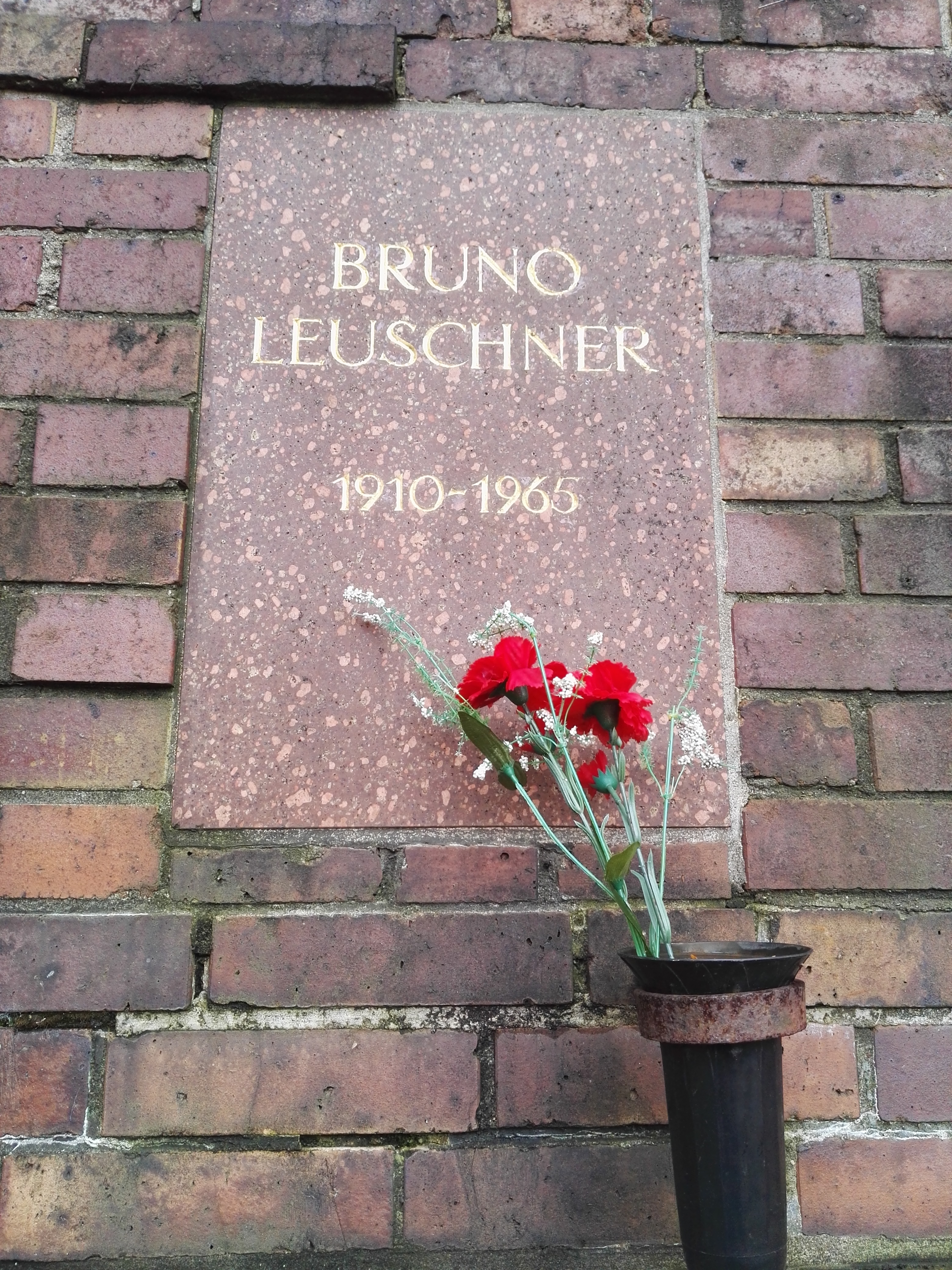 Grab von Bruno Leuschner in der Gedenkstätte der Sozialisten auf dem Zentralfriedhof Friedrichsfelde in Berlin-Lichtenberg